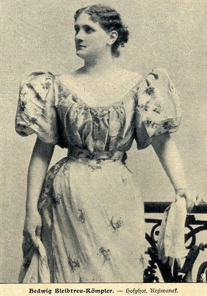 Hedwig Bleibtreu-Roempler, c. 1905